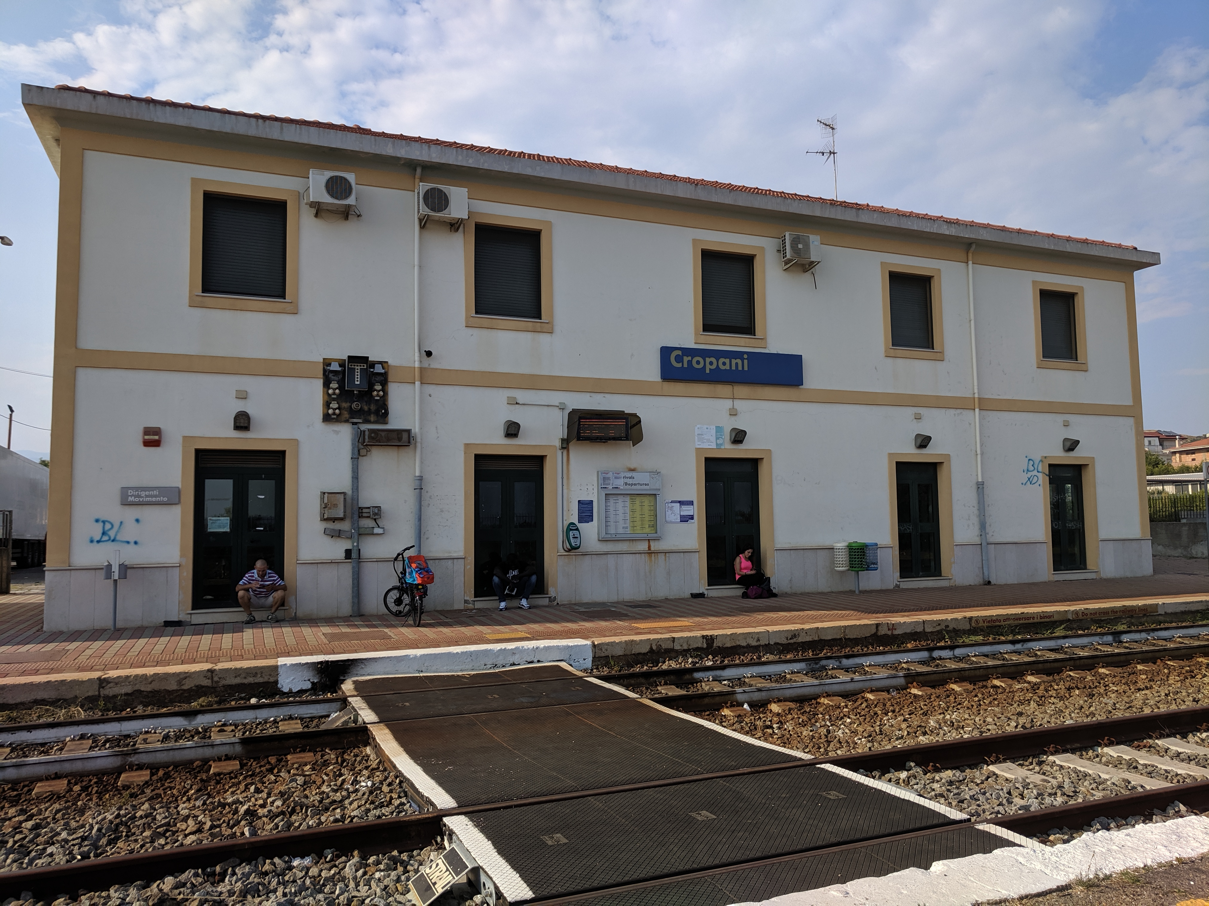 Vista binari della stazione di Cropani